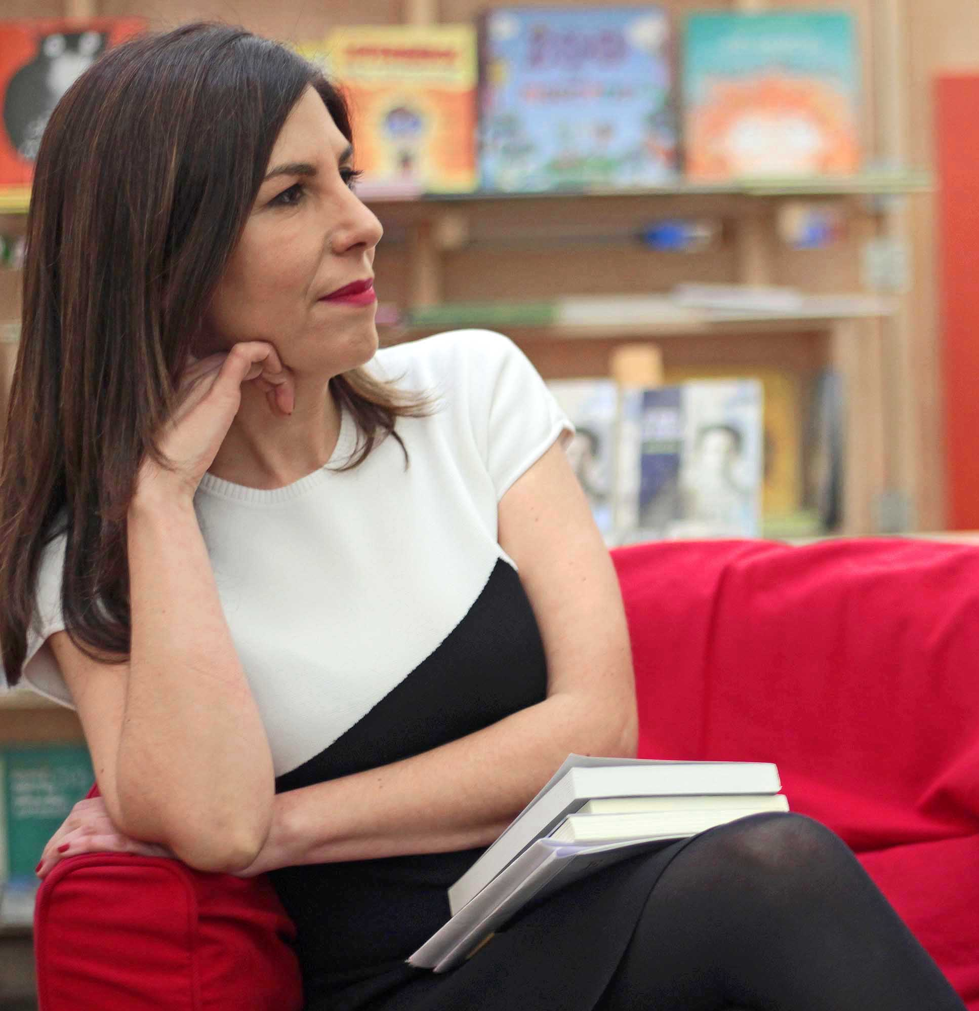 A escritora María Solar na presentación do libro Os Nenos da Varíola la libraría Moito Conto da Coruña.